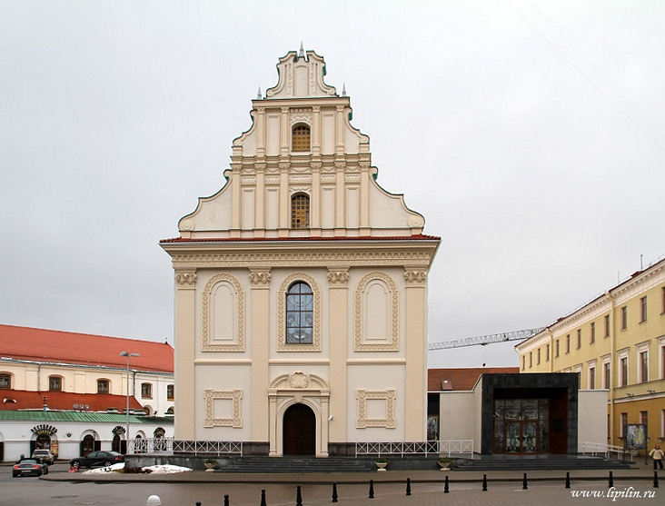 Мінск. Царква Святога Духа